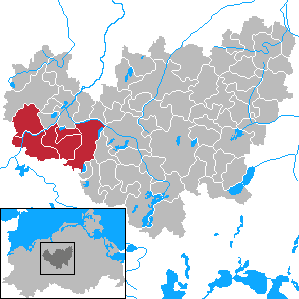 Former Amt Steintanz-Warnowtal in Mecklenburg-Vorpommern - District Güstrow